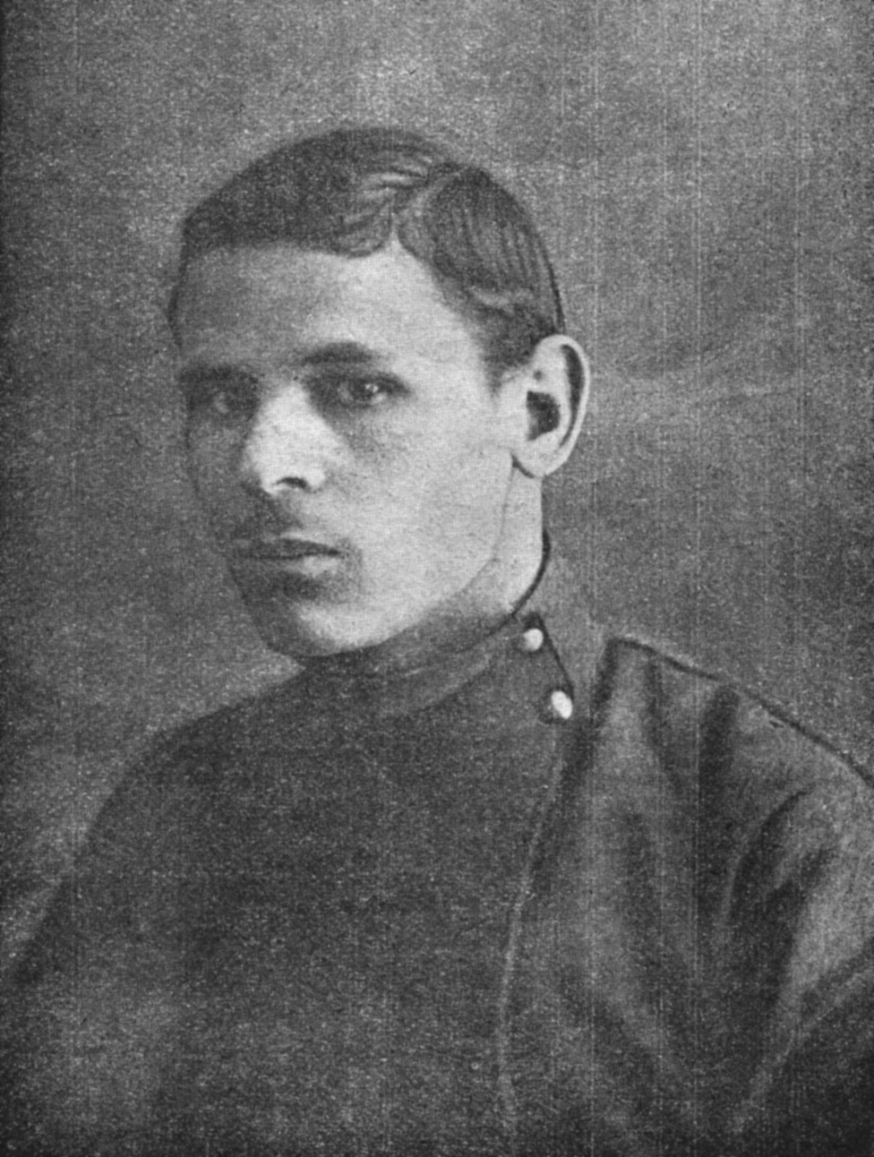 Заливчий Андрій Іванович (1892–1918), український політичний діяч та письменник.